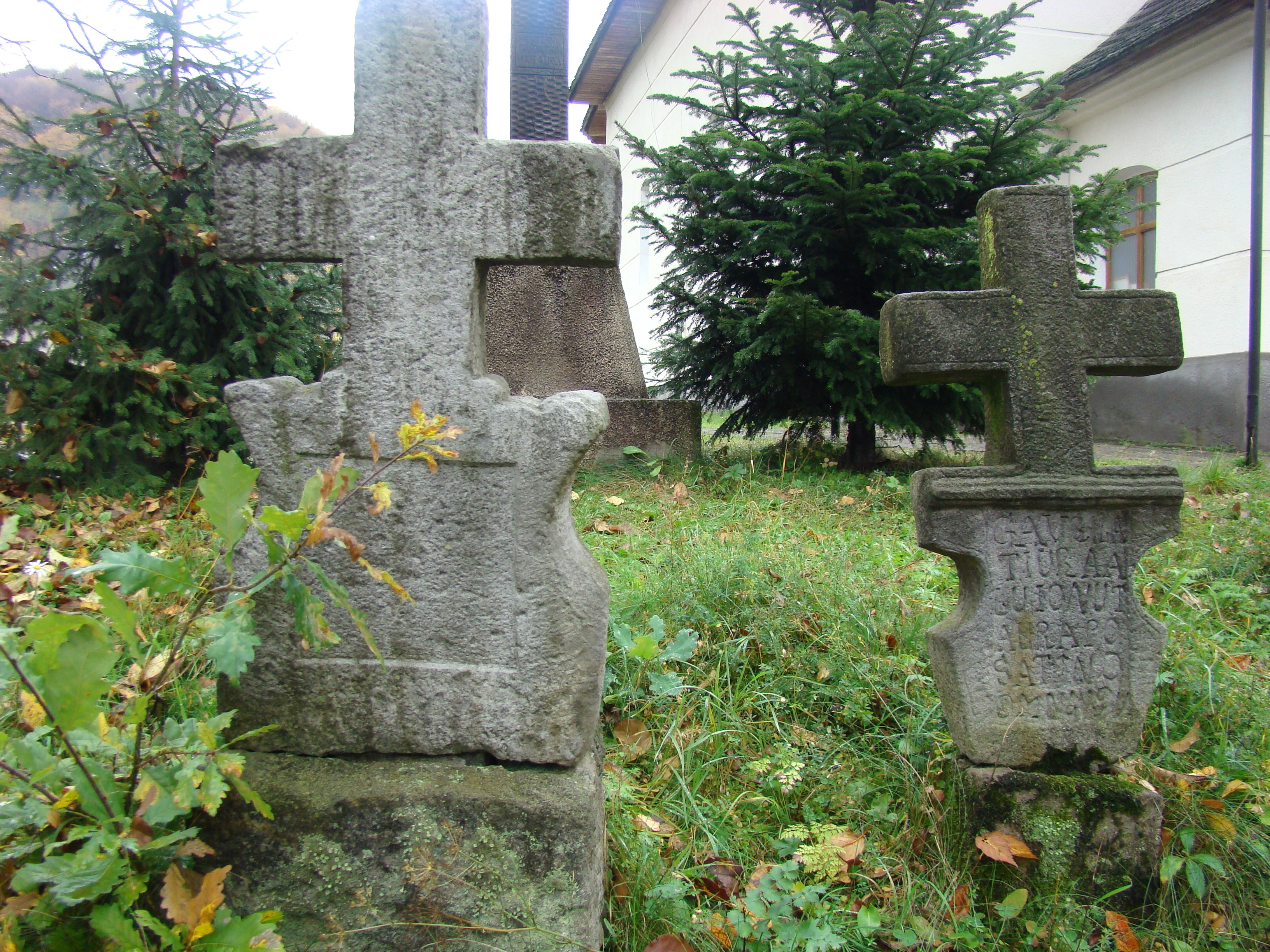 Cimitirul cu cruci de piatră, sat Cetățele; comuna Șișești, județul Maramureș 04